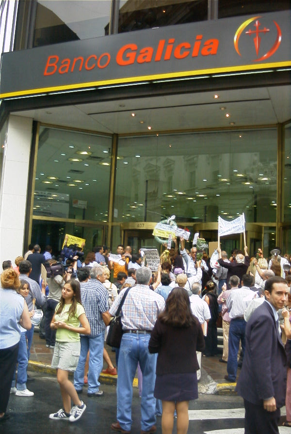 Manifestación de ahorristas argentinos contra el Corralito financiero en la puerta de la casa central del Banco Galicia, calle Reconquista y Perón , Buenos Aires, Argentina.